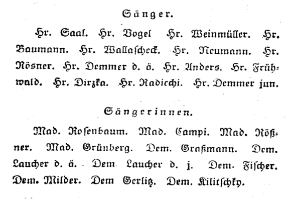 Sänger und Sängerinnen des Theaters am Kärntnertor in Wien im Jahr 1811